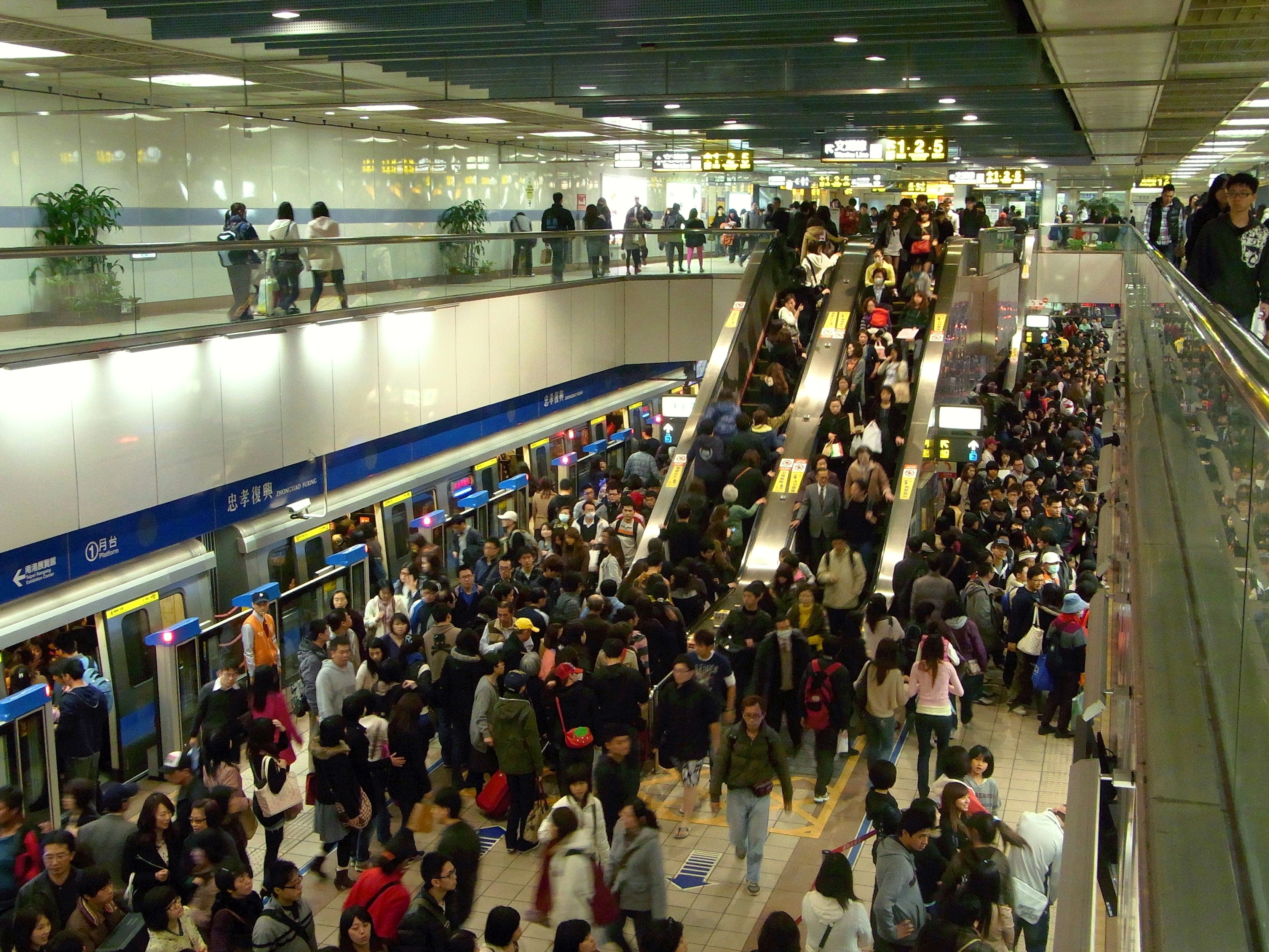 忠孝復興站藍線月台